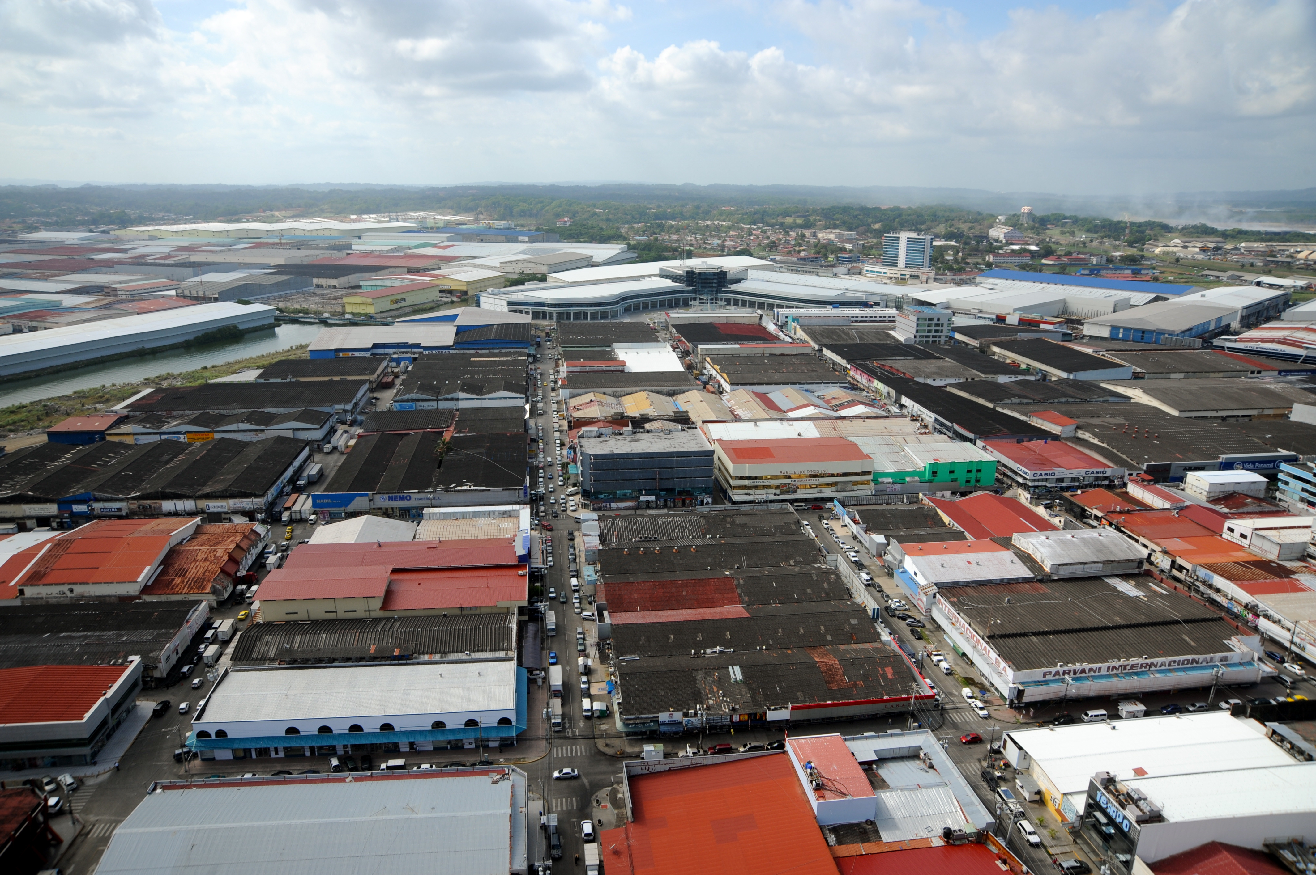 Zona Libre de Colón - Colón Free Trade Zone